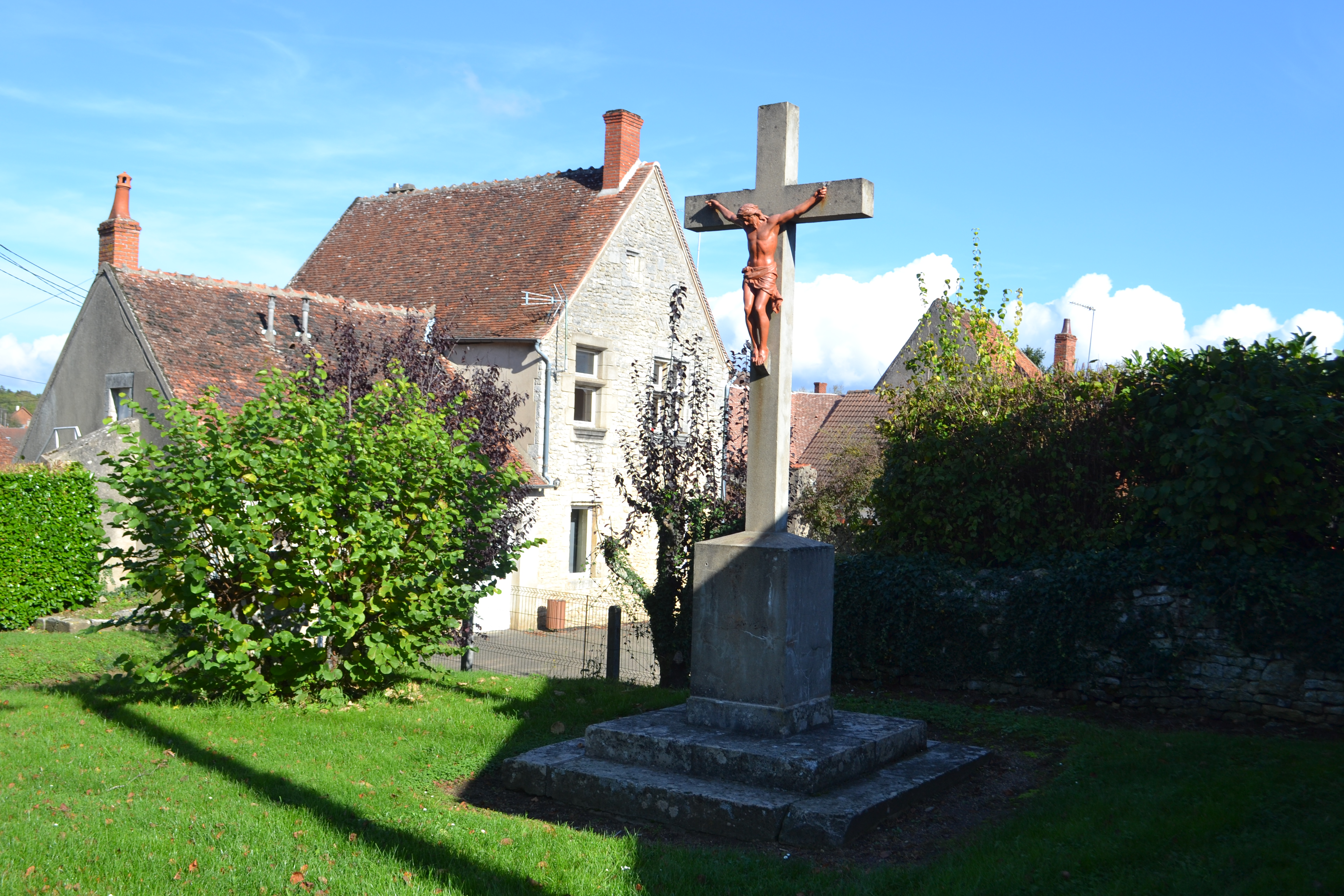 Calvaire de Narcy, Nièvre.